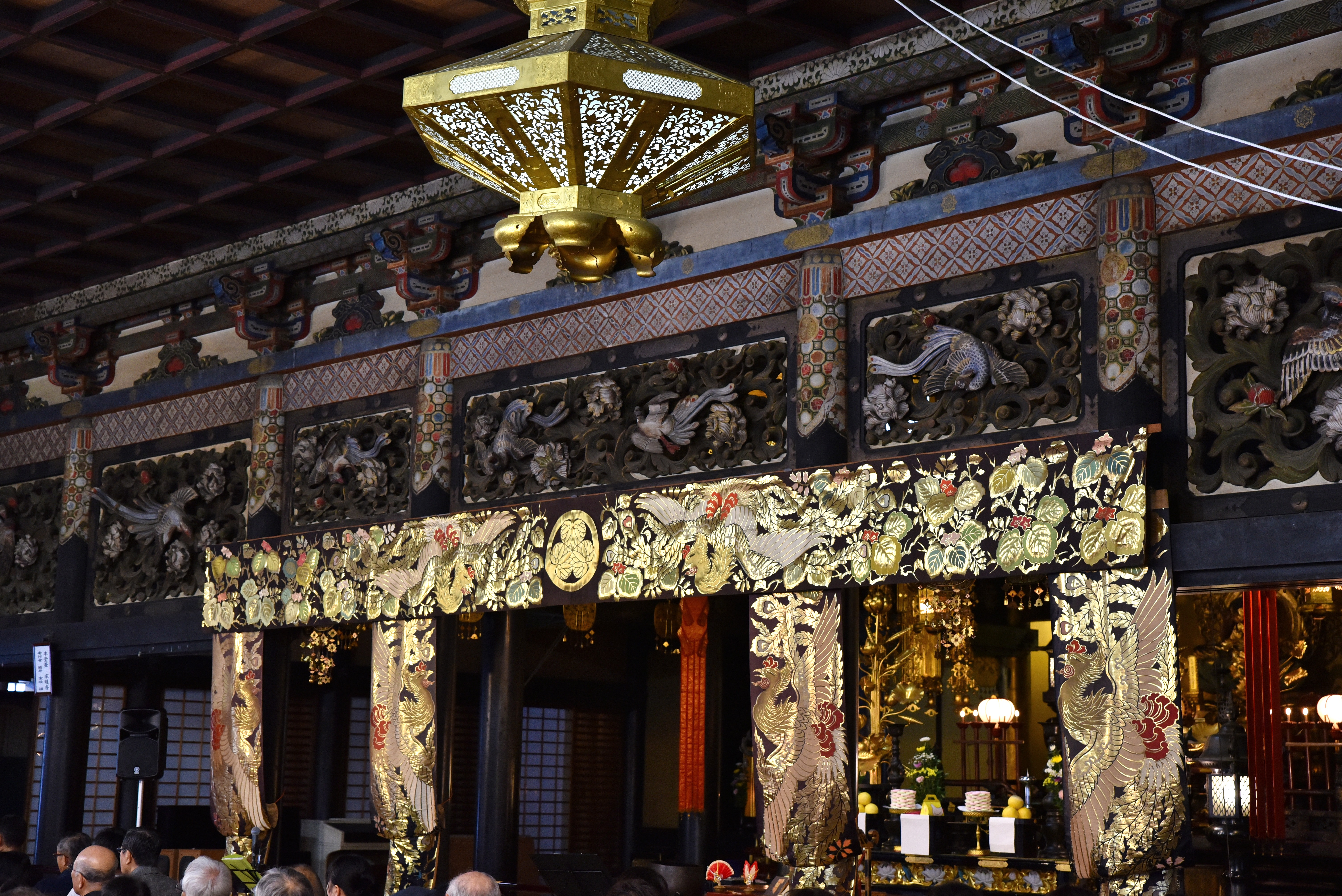 建中寺本堂の内陣